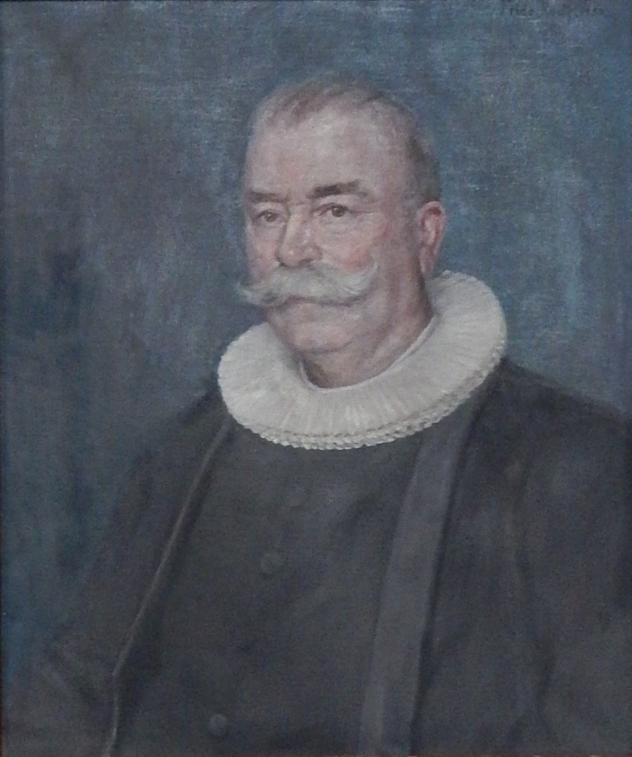 Portrettbilde av Anders Hovden i Hoff kirke, Østre Toten